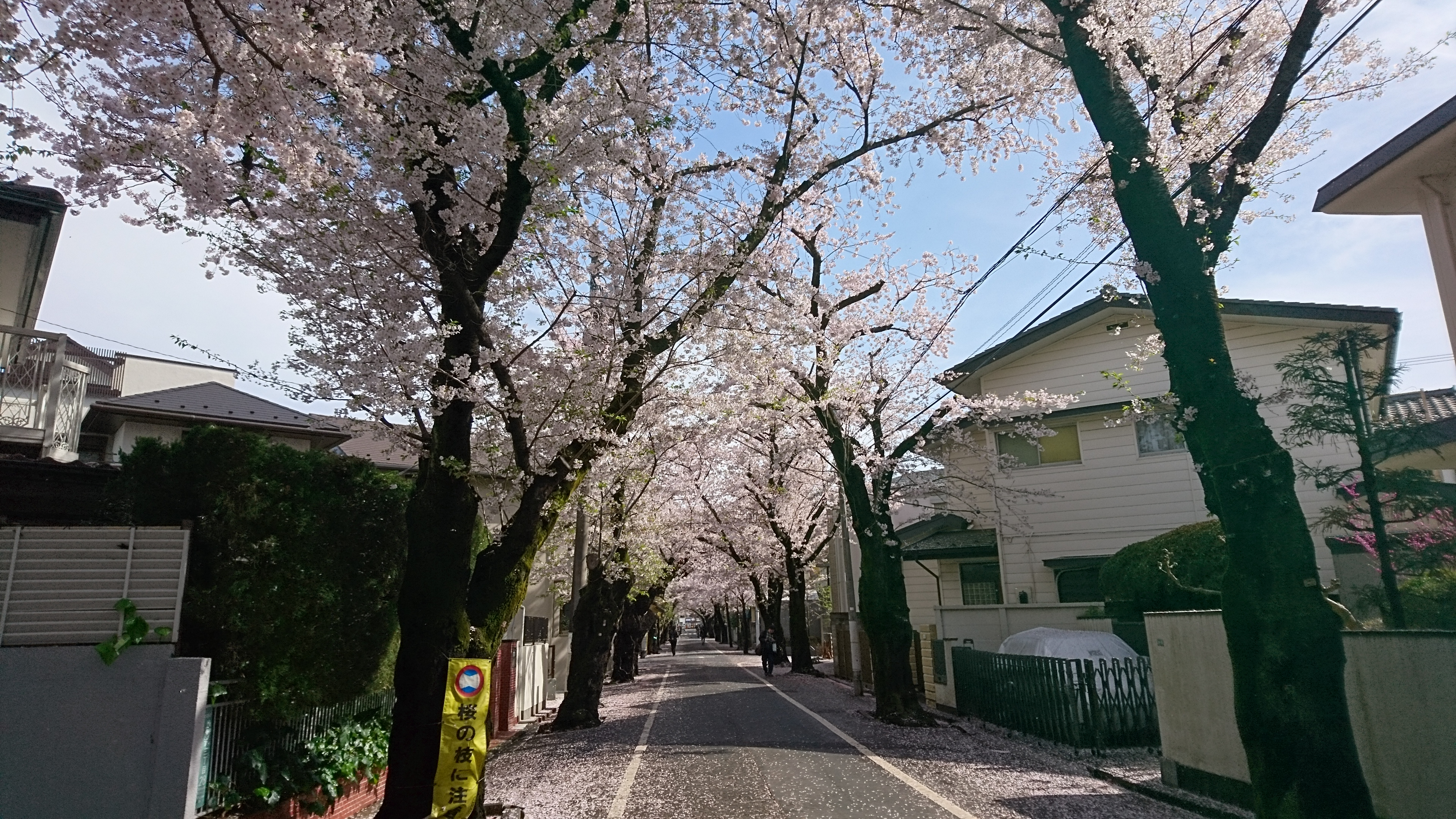 肋骨通りの桜（上北沢三丁目）